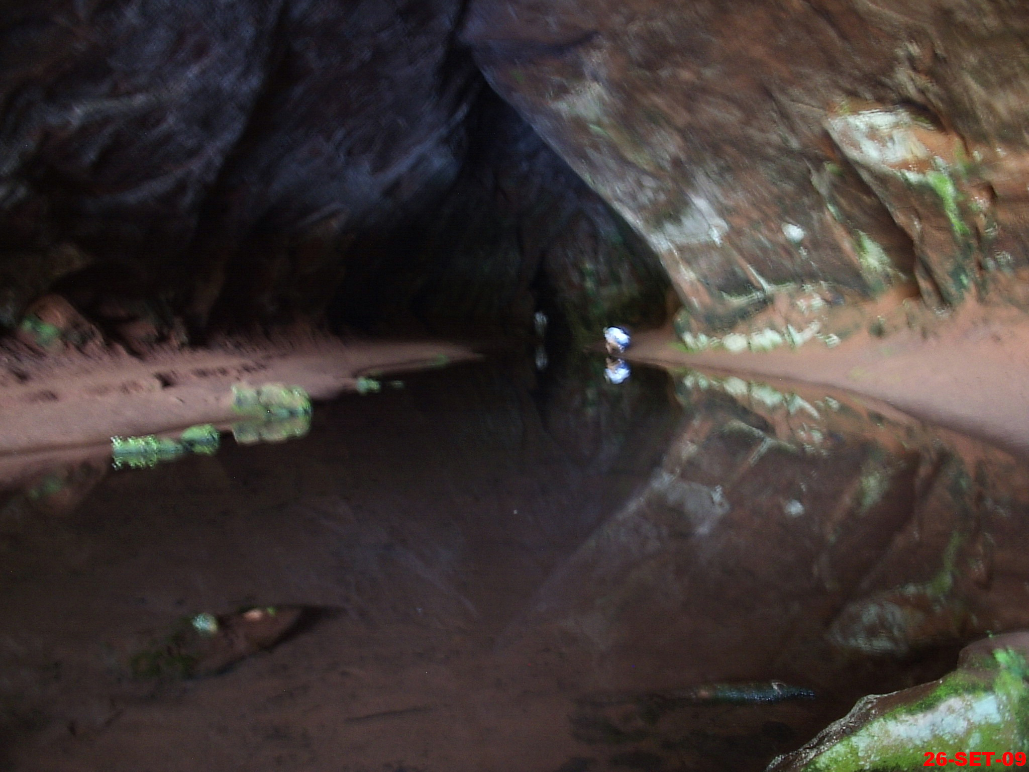 Gruta do Itambé - Altinópolis